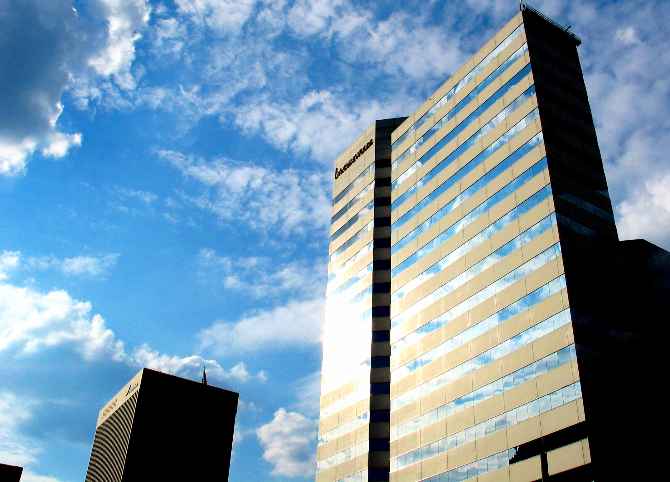 Richmond VA